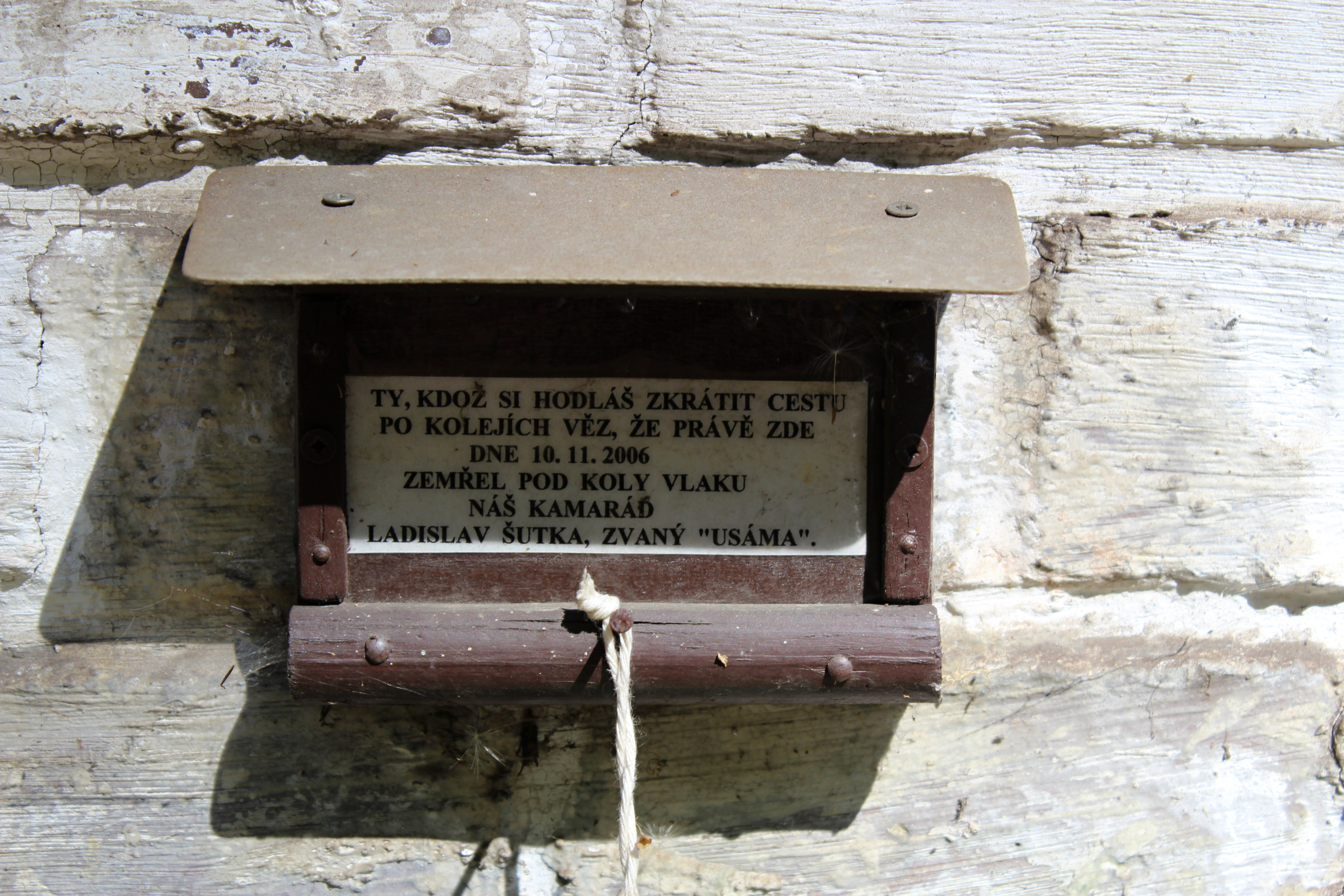 Davle nádraží pomíček detail